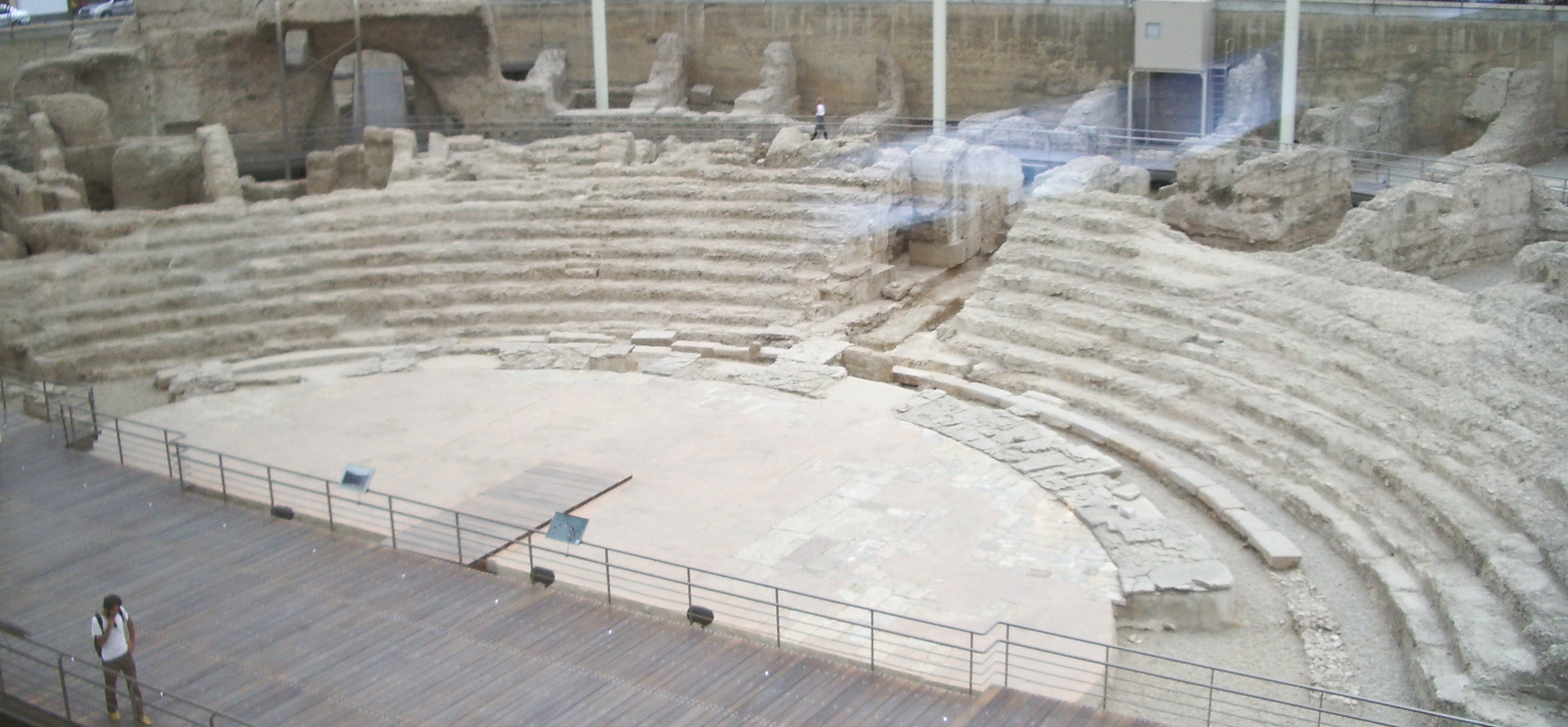 Teatro_Romano_Cesaraugusta-vista_desde_arriba